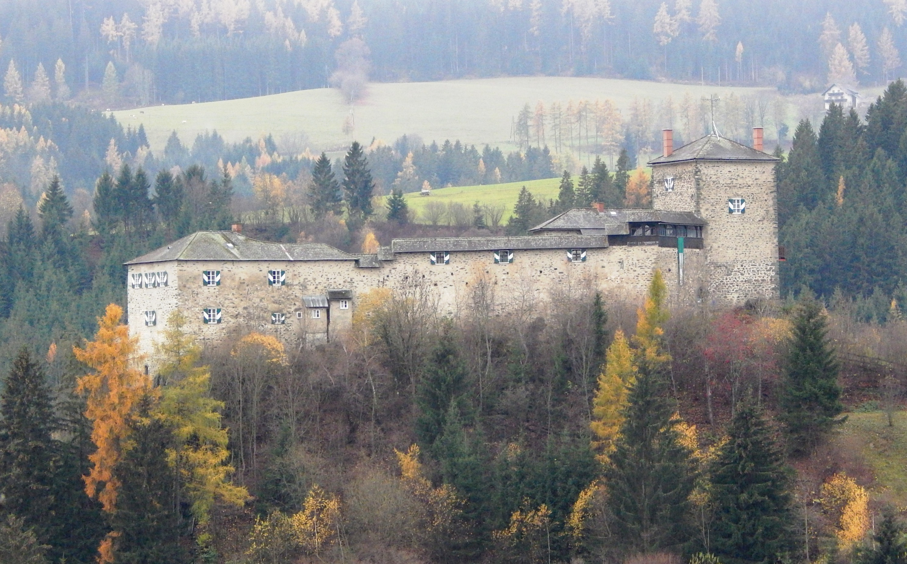 Burg Forchtenstein, Europahaus